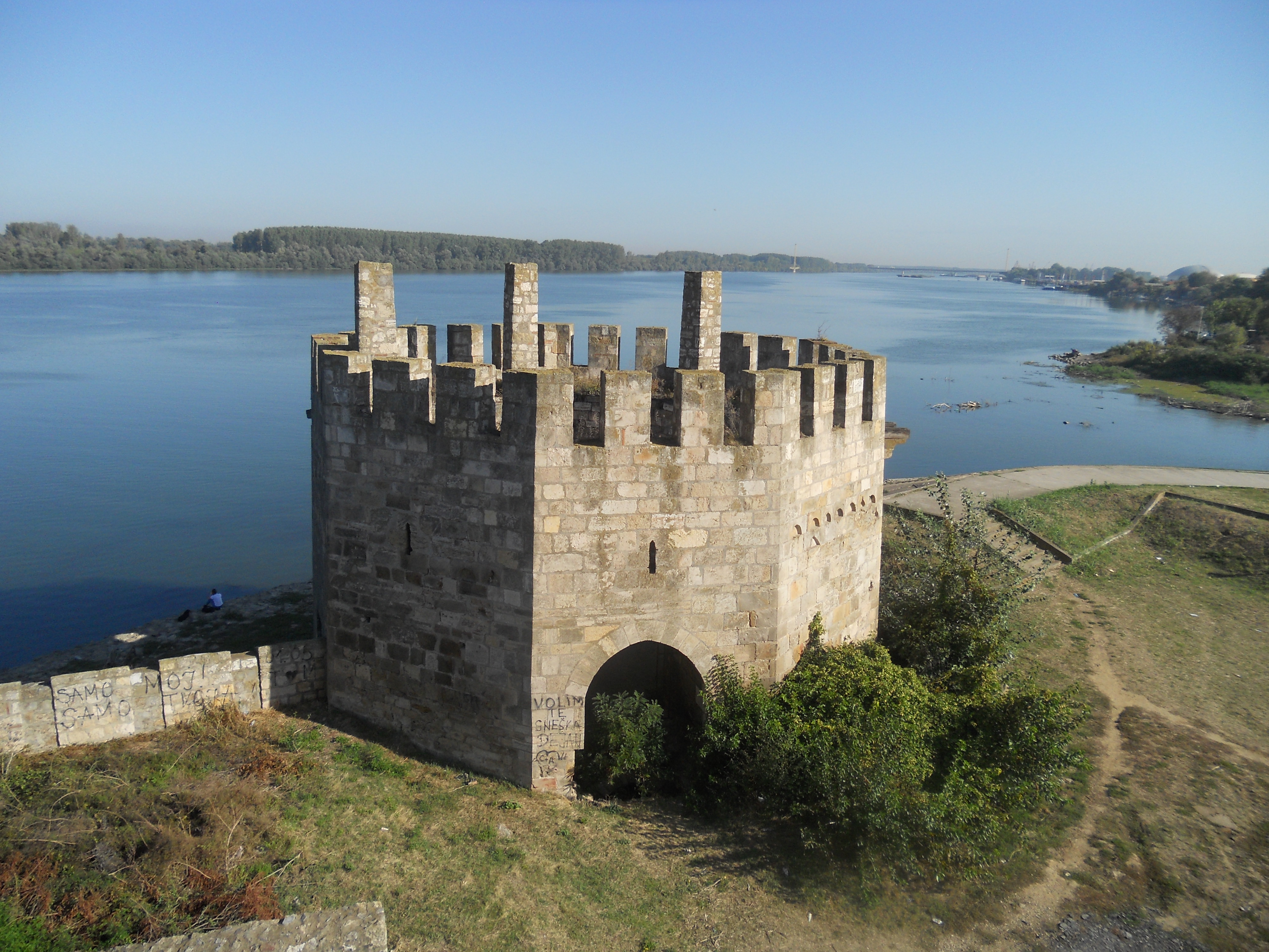 Smederevska tvrđava